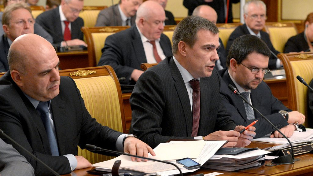 Руководитель Федеральной налоговой службы Михаил Мишустин, заместитель Министра экономического развития Олег Савельев